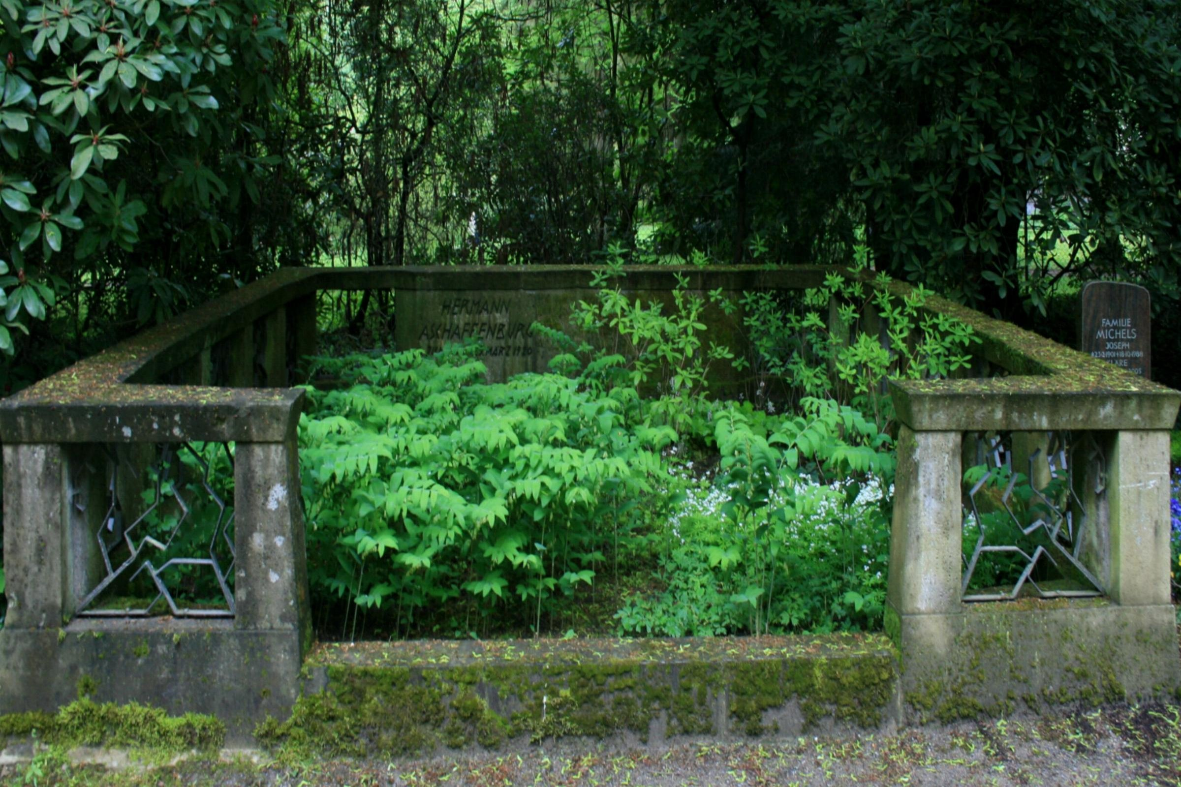 Denkmal in Mönchengladbach Grabstätte, Ehrenfriedhof, Peter-Nonnenmühlen-Allee in MG-Windberg